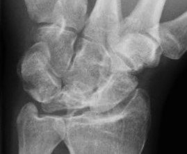 Dorsopalmare Röntgenaufnahme vom linken Handgelenk eines 58-jährigen Druckluftarbeiters: Lunatummalazie